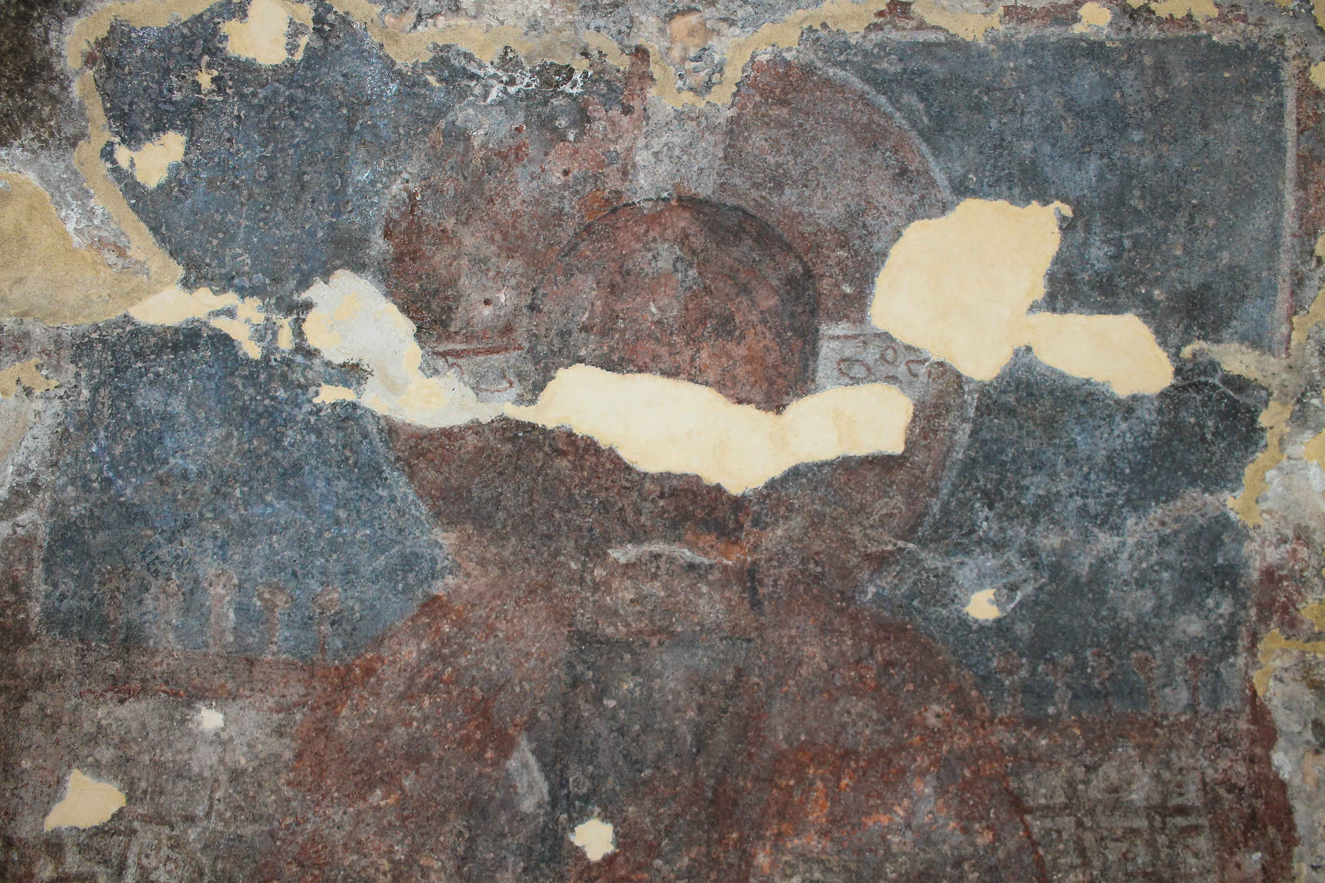 All'interno del parco archeologico del Castellaccio è possible ammirare anche il cosiddetto "Oratorio di santa Lucia", una caverna usata dalle suore tra il XII° ed il XIV° secolo come luogo di culto; sul sito è possibile ancora osservare ed ammirare i resti degli scalini d'entrata dell' epoca, una sepoltura scavata nel pavimento ed un preziosissimo ciclo di affreschi, datati intorno al XIV° secolo: tra di essi quello che da il nome al all'oratorio, ovvero quello di Santa Lucia, poi un Cristo Pantocratore alla sua sinistra, alla sua destra un santo barbuto ( si pensa san Nicola), una mater Domini e i resti di un affresco raffigurante un santo a cavallo ( si penso san Giorgio). Questi affreschi sono di grande importanza per il territorio, perché insieme ad altri, come quelli delle grotte del crocifisso ( nei paraggi), sono esempio di pittura rupestre del paese e di come la gente si adeguasse al territorio.